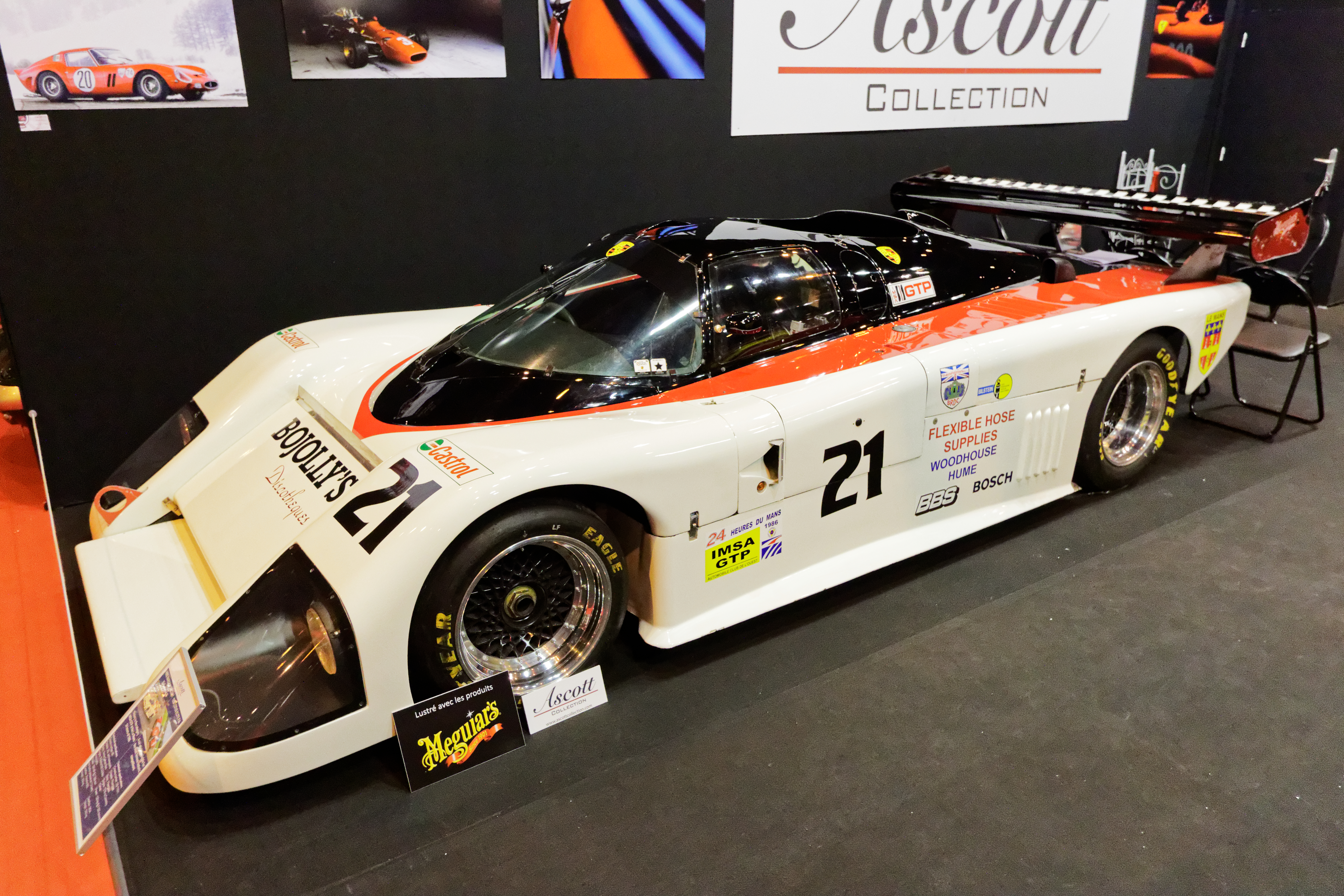 Une des voiture présentée lors du salon Rétromobile de Paris 2015